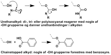 Modificering af alkyder